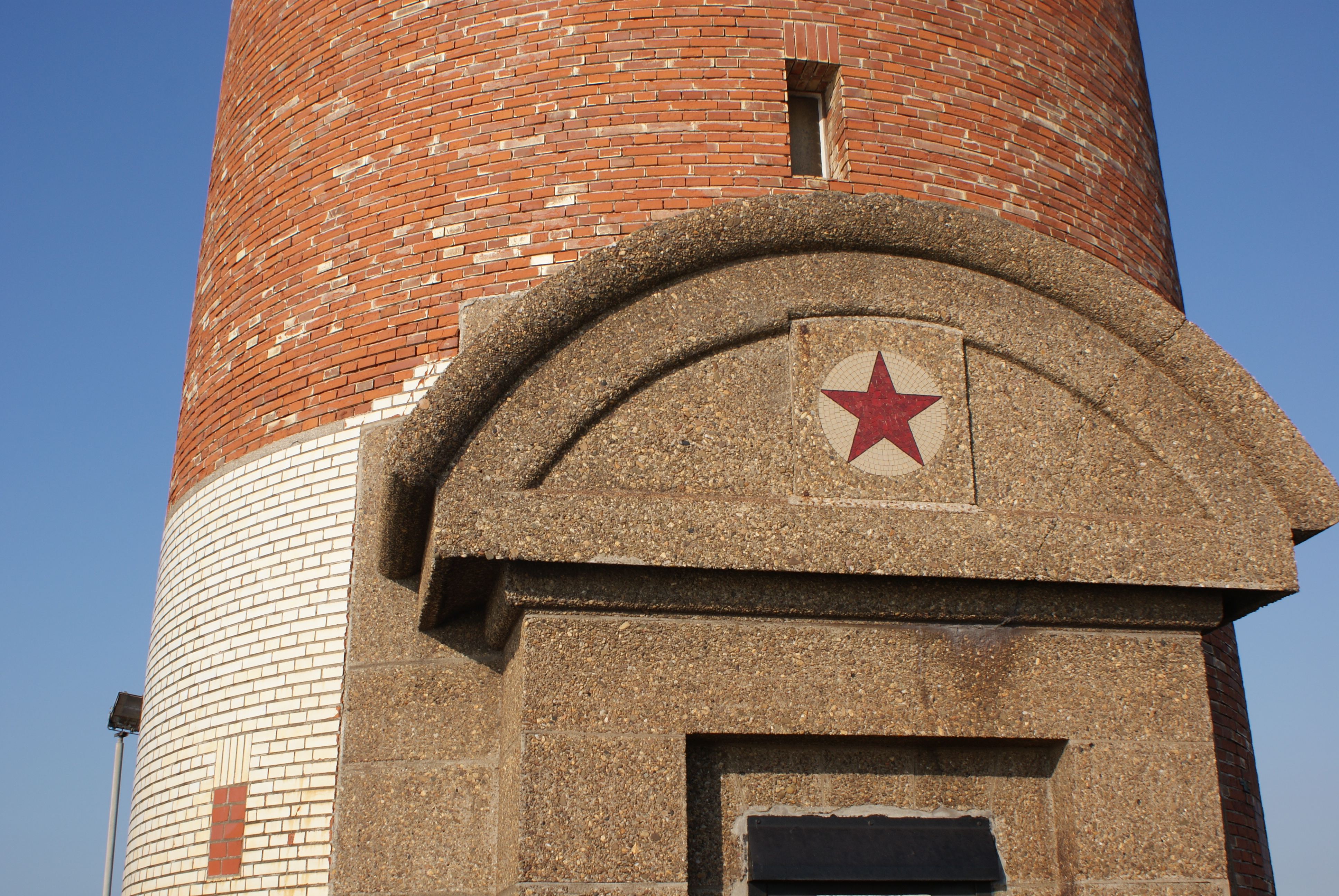 Feu de saint-Pol - Dunkerque, France